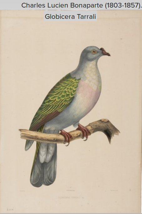 Charles-Lucien Bonaparte, Globicera tarrali, spécimen capturé à Vanikoro (expédition Dumont d'Urville), conservé au Muséum national d'histoire naturelle.